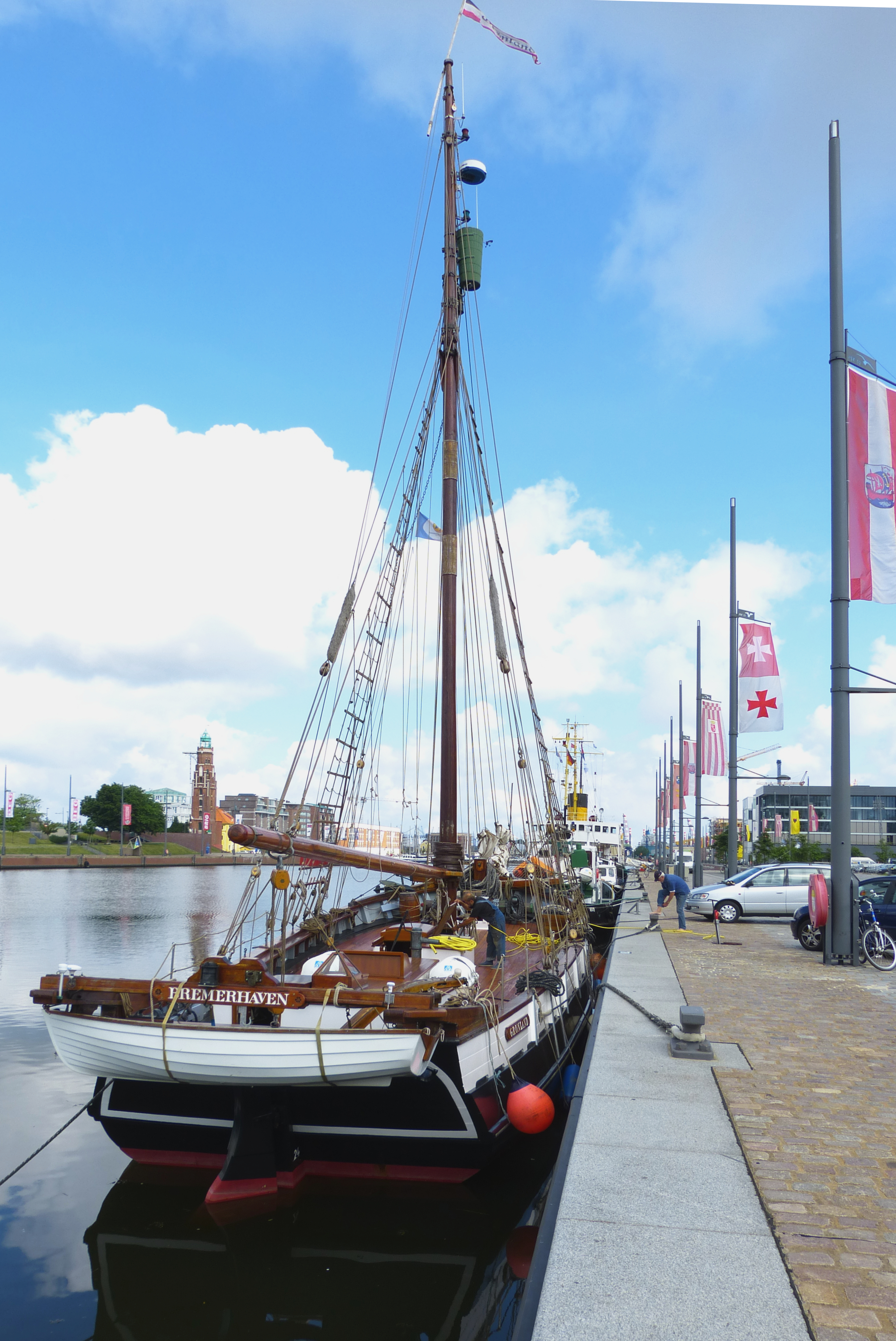 Nordische Jagt "Grönland" in BremerhavenDas abgebildete Objekt ist ein geschütztes Kulturdenkmal in der Freien Hansestadt Bremen, mit der Nr. 1737,T003 beim Landesamt für Denkmalpflege registriert.